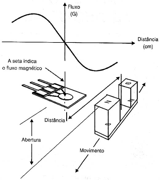 Configuração de um sensor de efeito Hall por passagem lateral com dois imãs separados